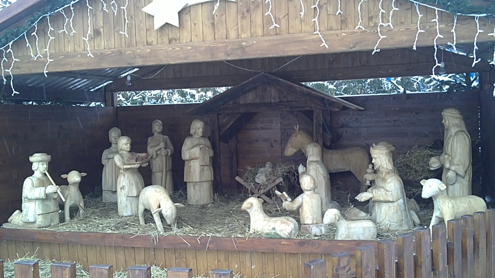 Betlehem v Prievidzi v r. 2011